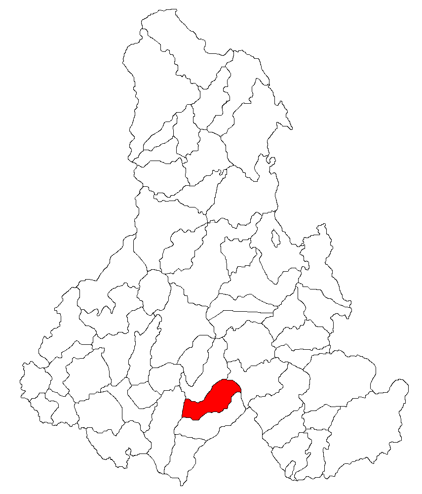 Categorie:Hărţi ale judeţului Harghita Contents 1 Licensing 2 Sursă 3 Licensing 4 Original upload log Licensing Sursă ro::Imagine:Harta_jud_Harghita.png